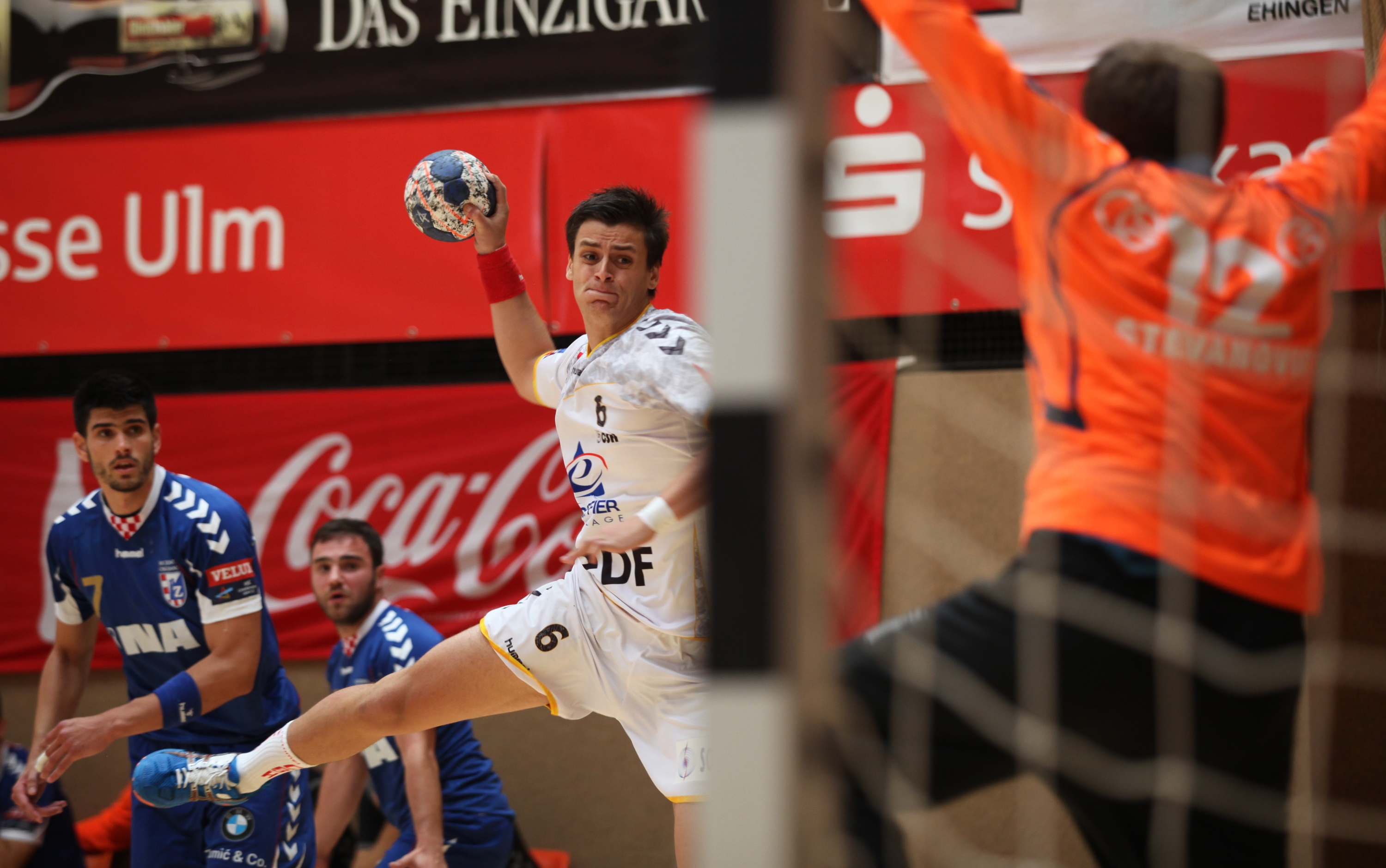 Antoine Blanc, Handballspieler von Chambéry Savoie Handball am 16. August 2014 beim Sparkassen-Cup in Ehingen.